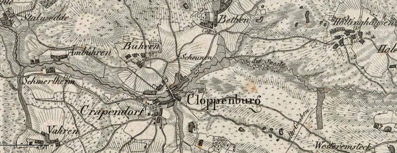 Topographische Karte in 22 Blättern den größten Theil von Westphalen enthaltend, so wie auch das Herzogthum Westphalen und einen Theil der hannövrischen, braunschweigischen u. heßischen Länder ; nach astronomischen und trigonometrischen Ortsbestimmungen / hrsg. vom General-Major von LeCoq im Jahr 1805. Gest. von Carl Jäck (u. a.). - Berlin, ca. 1805. Karte vom südlichen Theil des Herzogthums Oldenburg eines Theils der Grafschaften Hoya und Diepholz und des Gebietes der Stadt Bremen